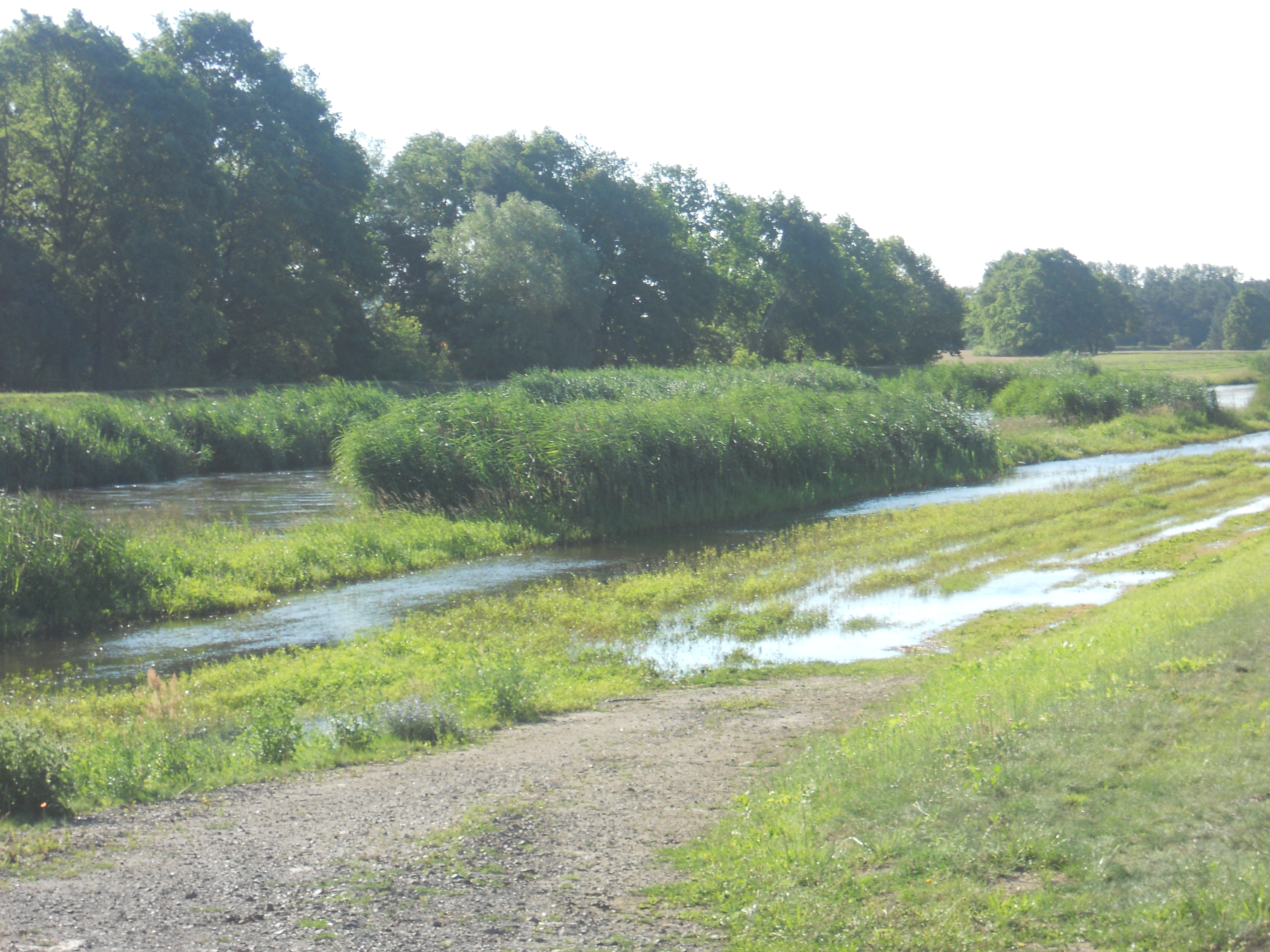 Beispiel für Hochwasserwarnstufe 1